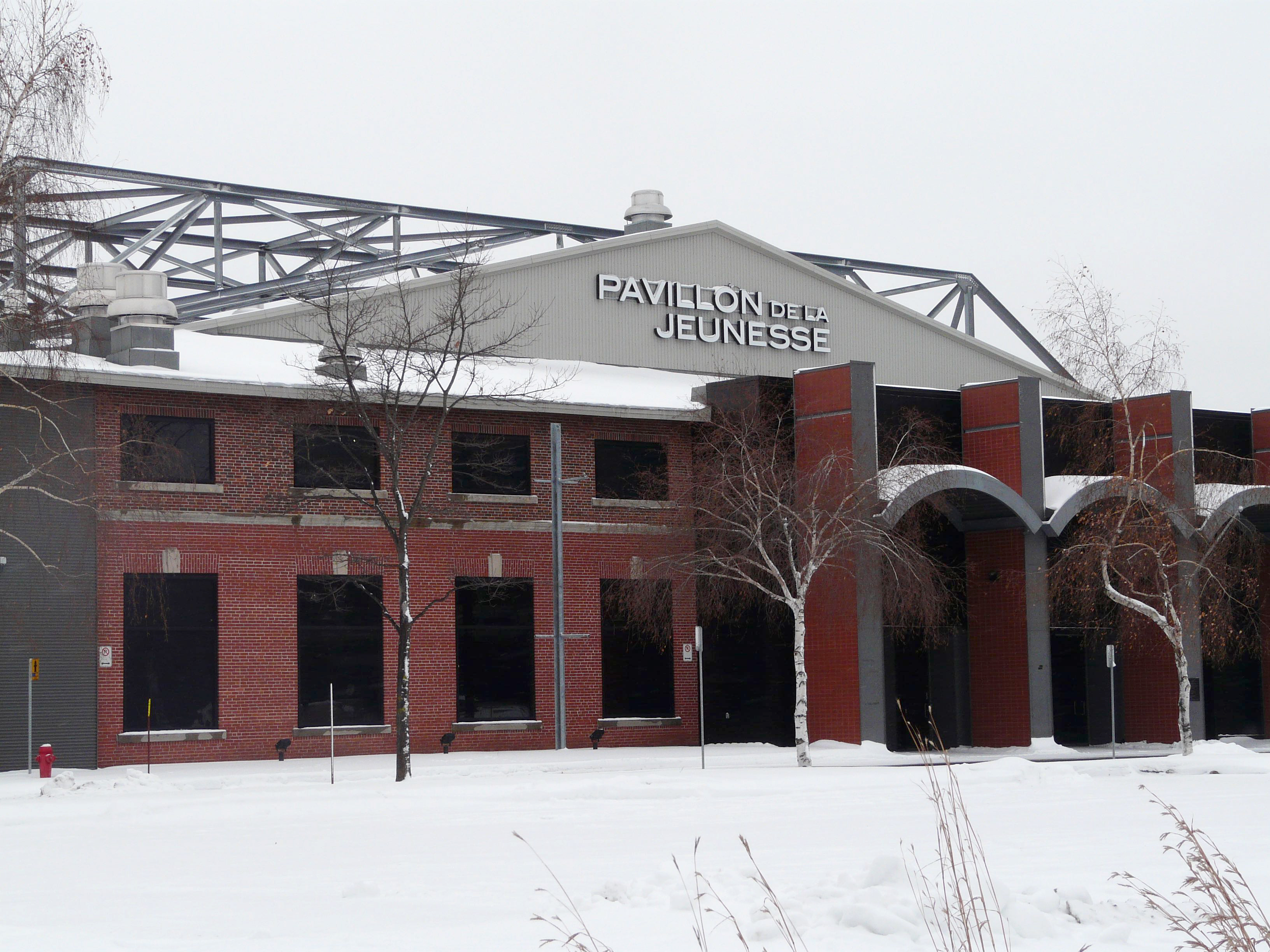 Entrée principale du Pavillon de la Jeunesse, à Québec